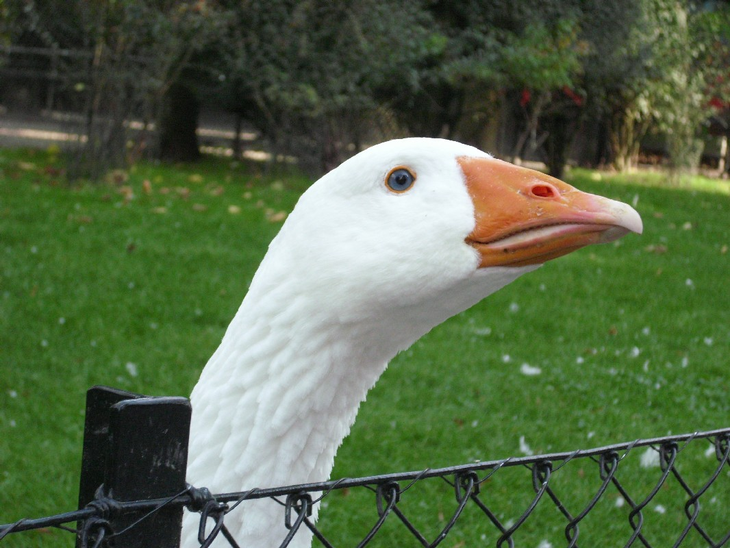 Hausgans (Emder Gans) / Domestic goose (Embden Goose) – Tierpark Hagenbeck, Hamburg